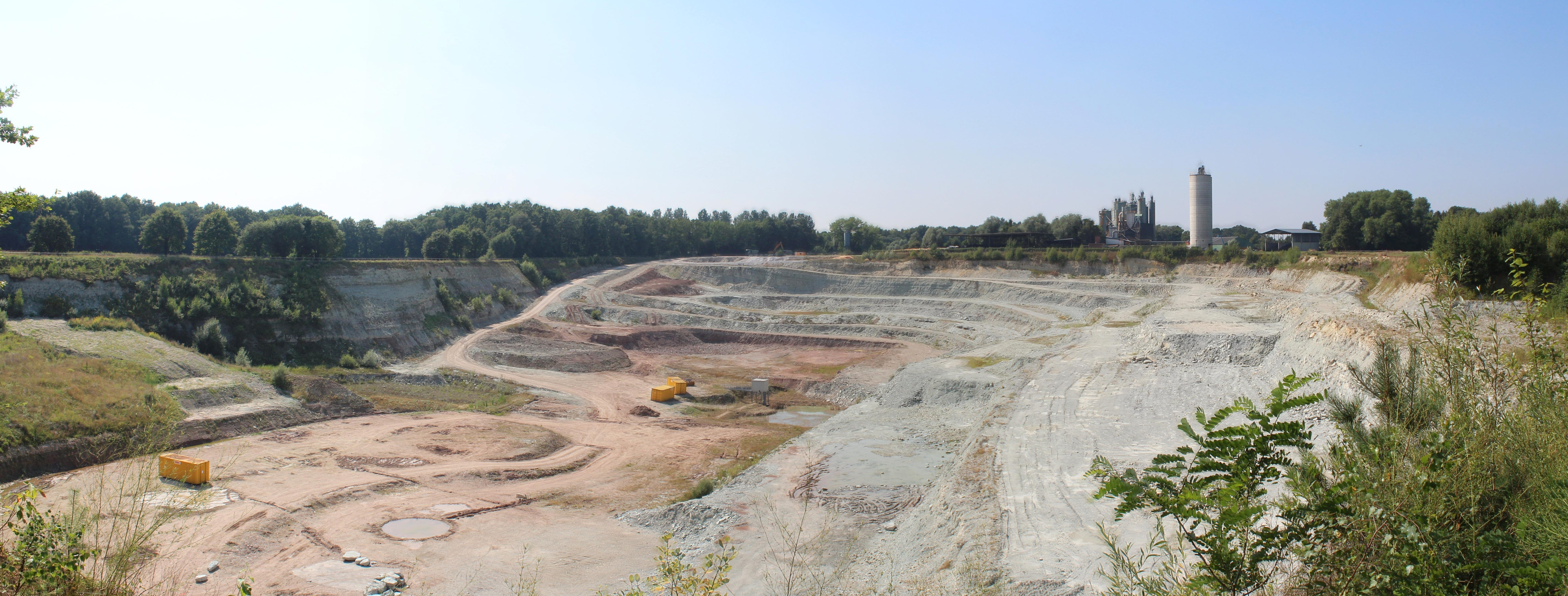 Winterswijk panorama steengroeve